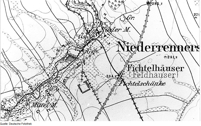 Original image description from the Deutsche Fotothek Berthelsdorf-Rennersdorf. Meßtischblatt, Sekt. Löbau, 1884